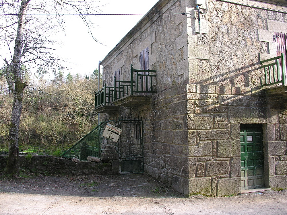 Couto de Ximonde, Río Ulla concello de Vedra, (Galicia)